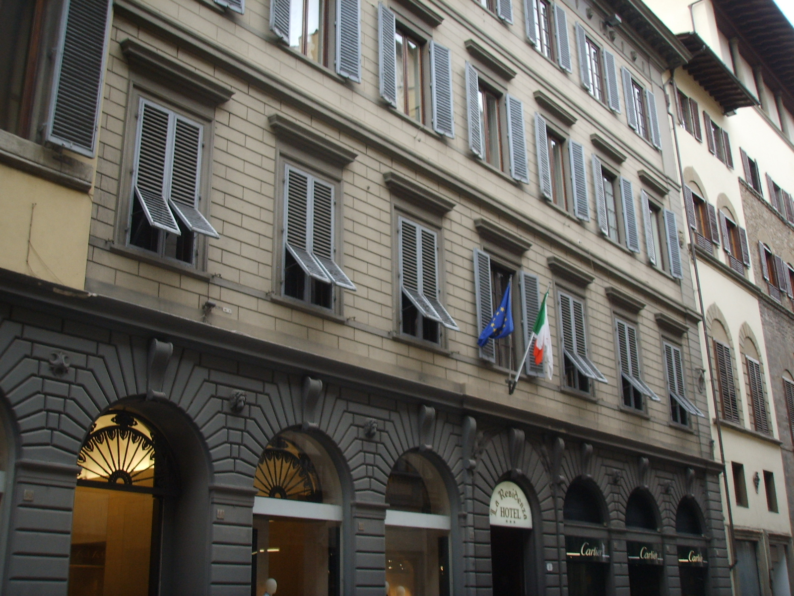 Palazzo altoviti sangalletti, ex- caffé doney